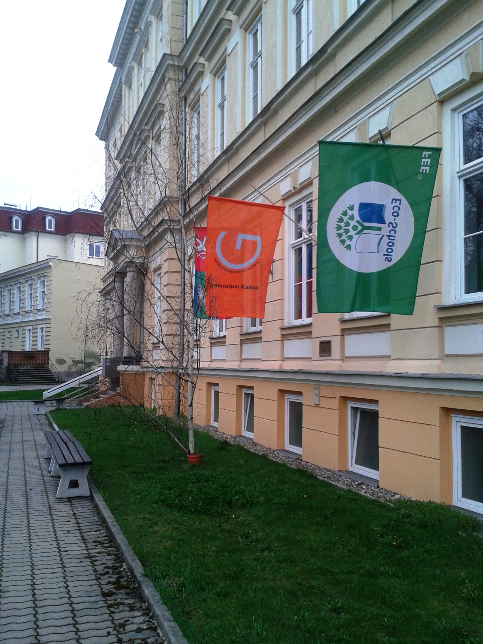 Budova a vlajky Gymnázia v Kadani.